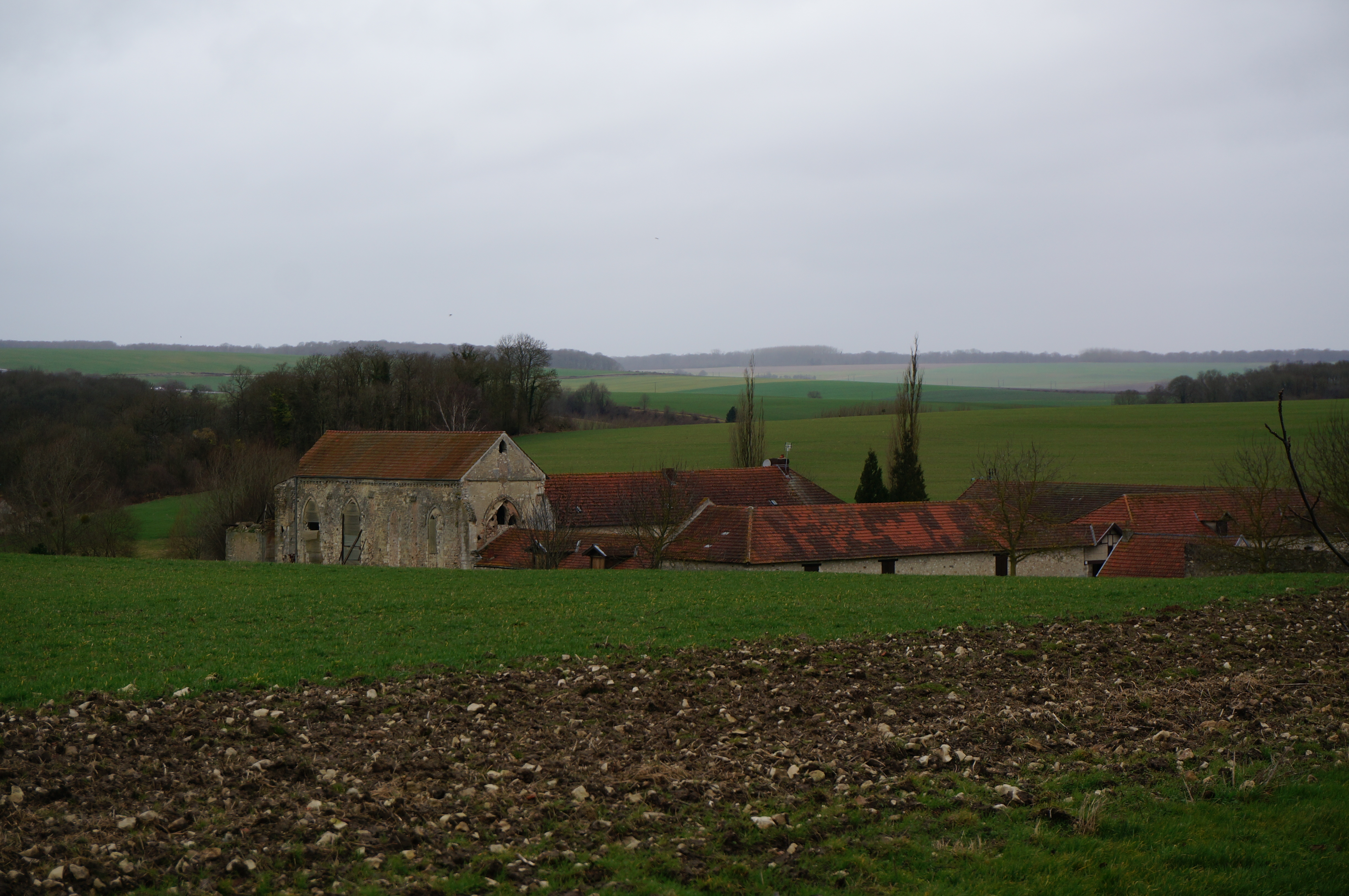 La ferme du temple de passy grigny.